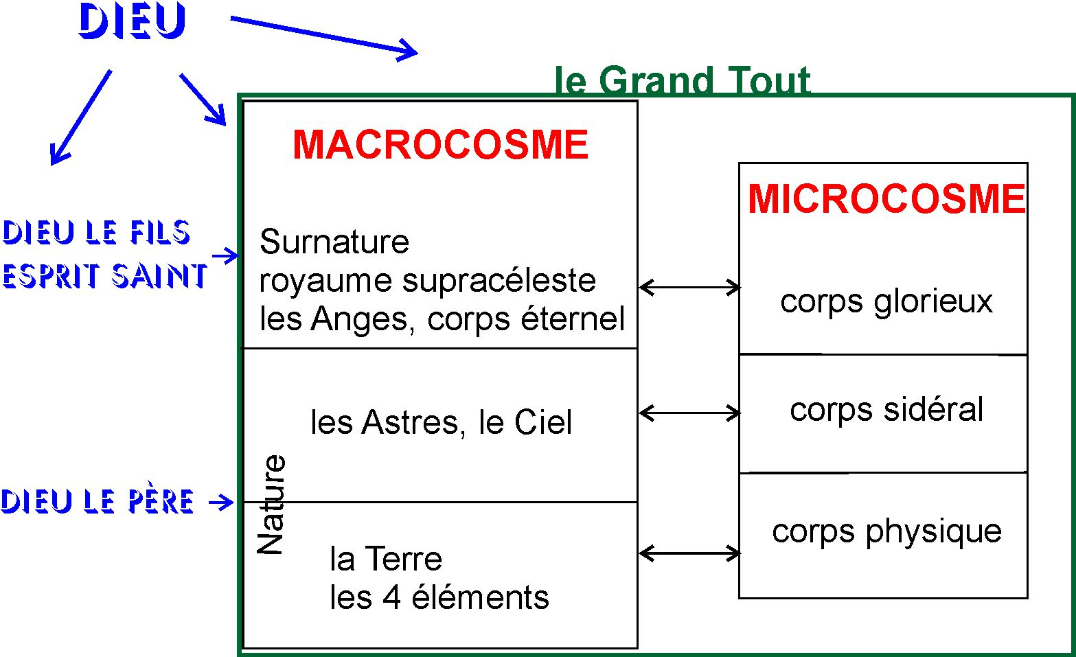 Correspondance microcosme-macrocosme chez Paracelse